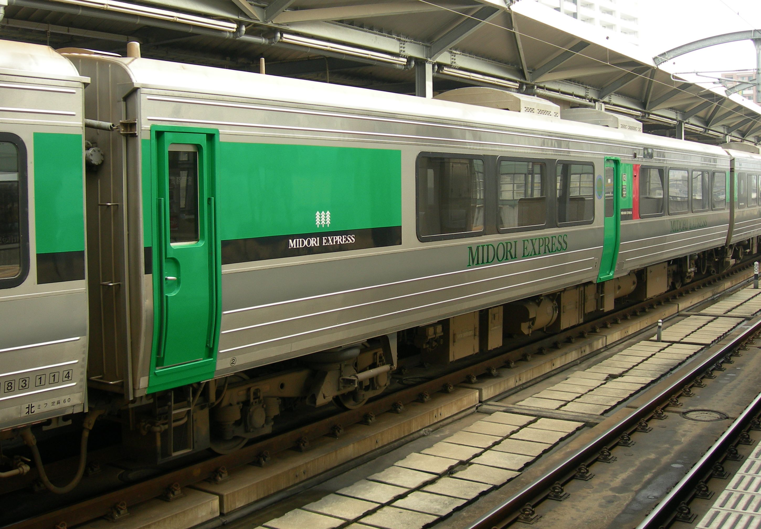 JR九州783系電車サハ783形200番台